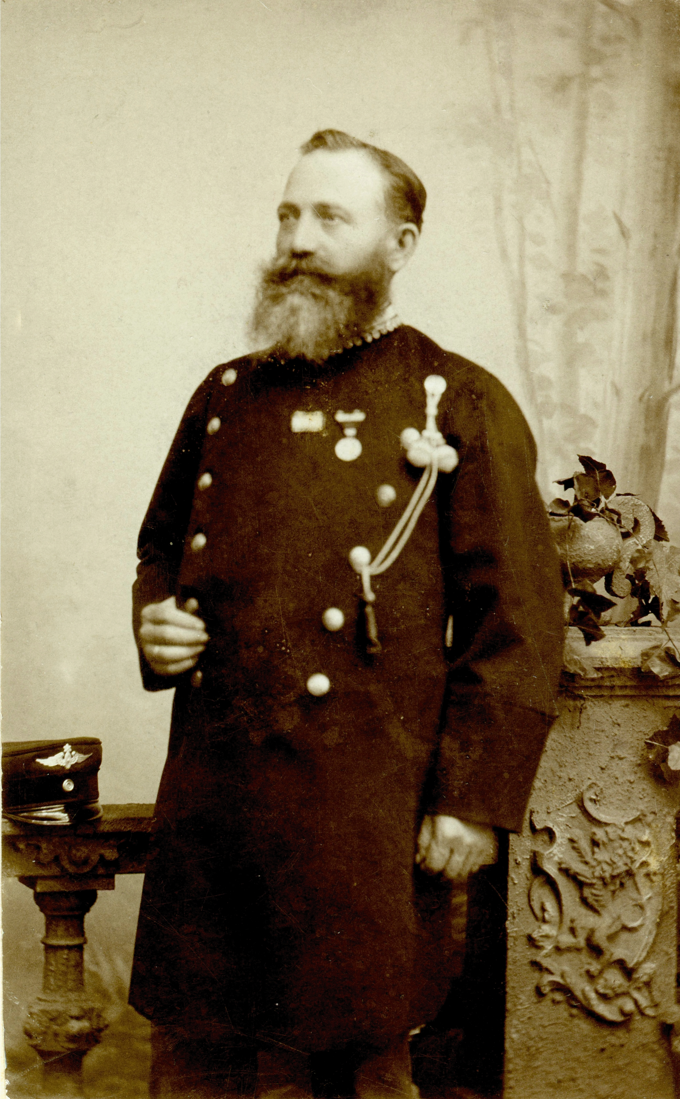 Photo des Zugführers Jakob Kastner zum 25-jährigen Dienstjubiläum